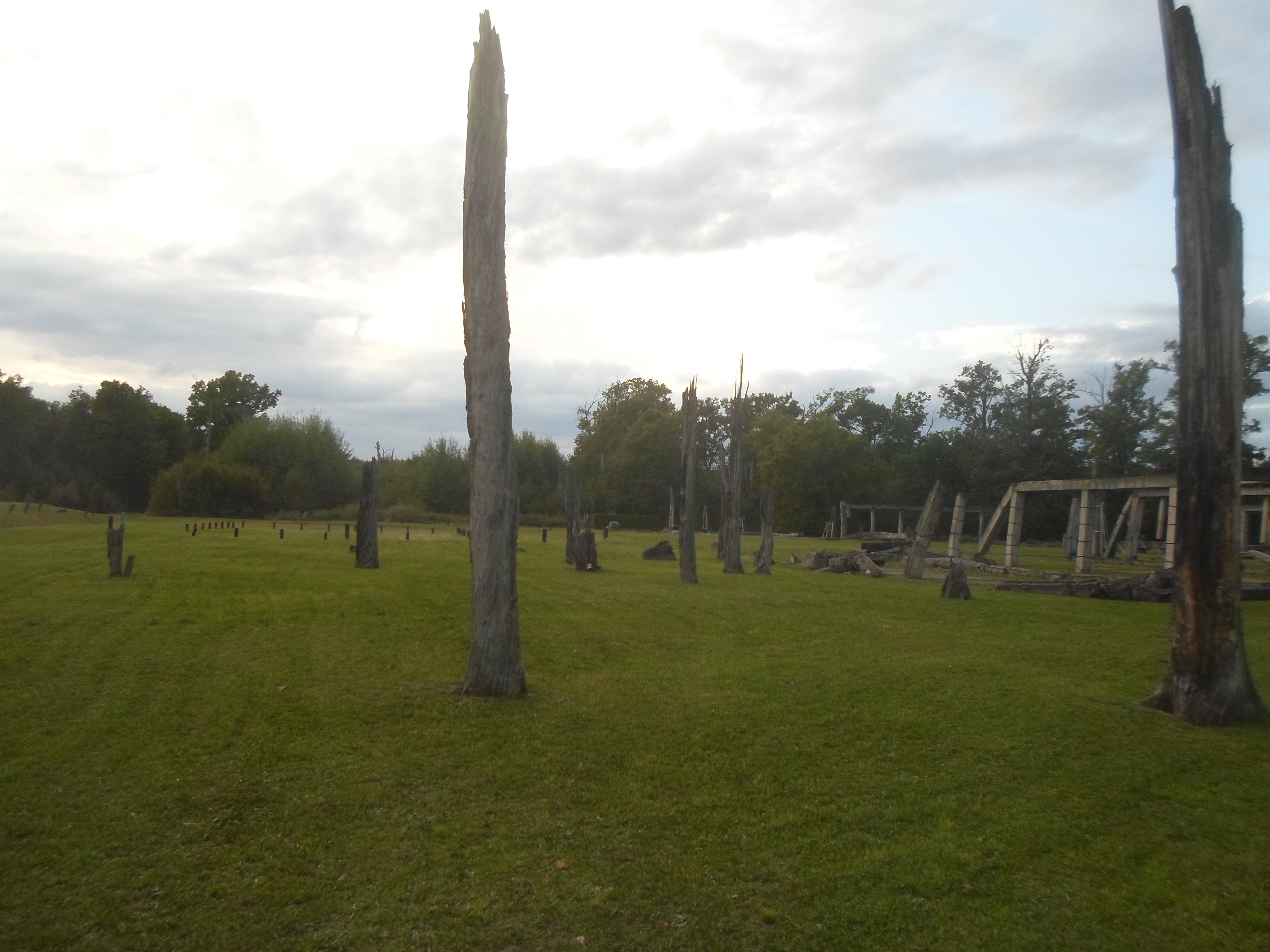 Barutana Bjelovar